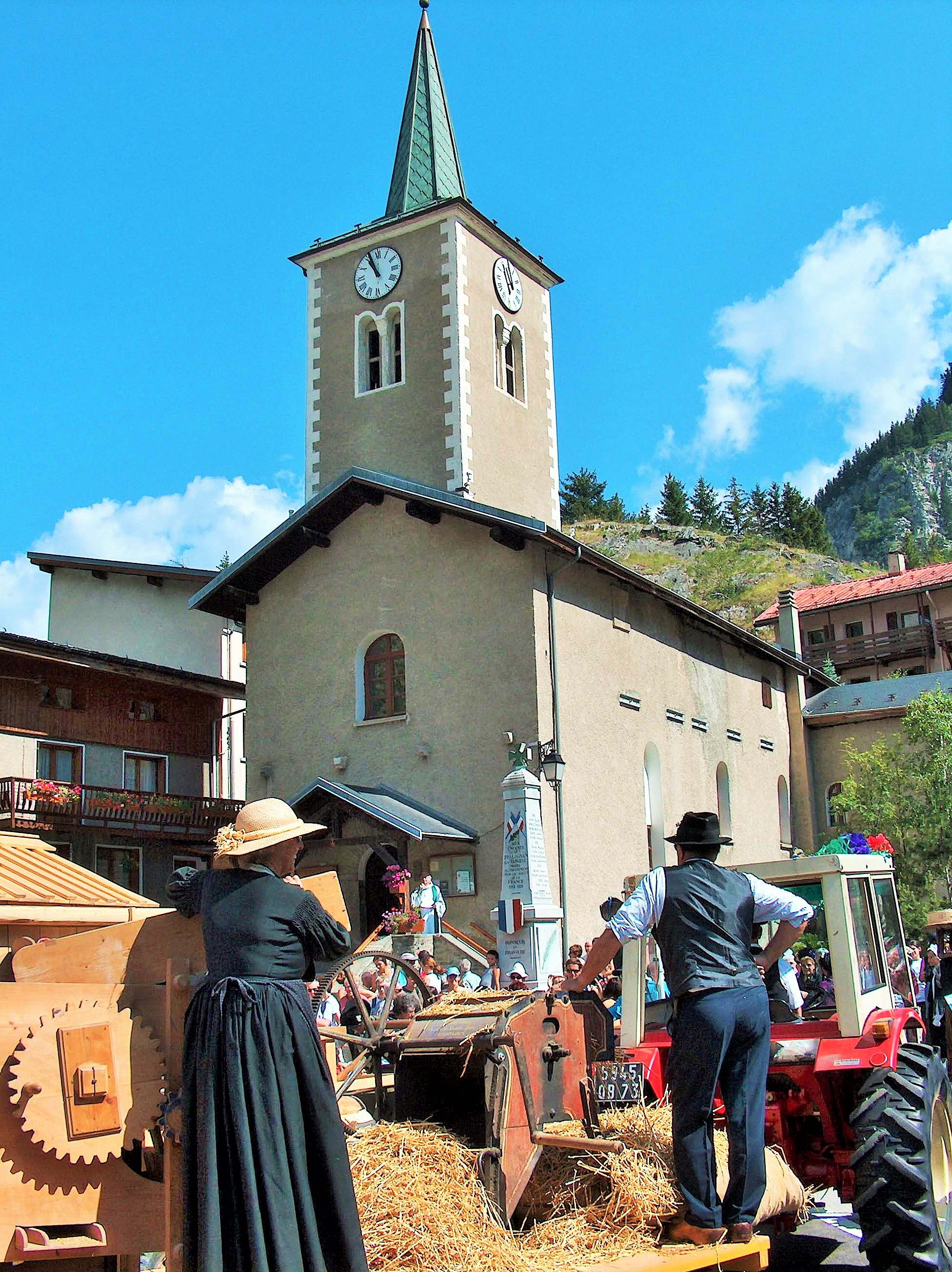 Eglise de Pralognan-la-Vanoise (avant l'eefondrement du clocher)